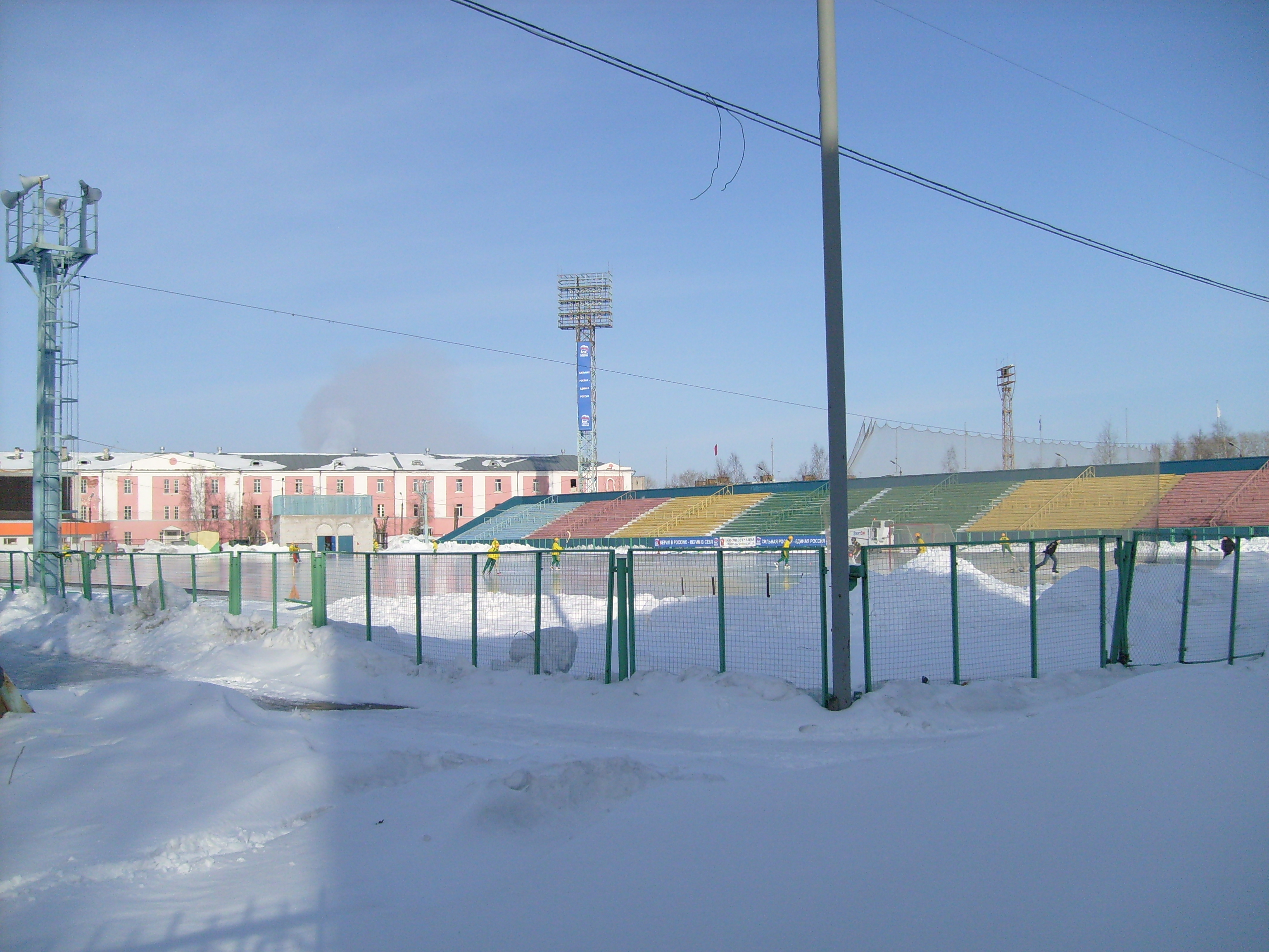 Стадион «Труд», Архангельск